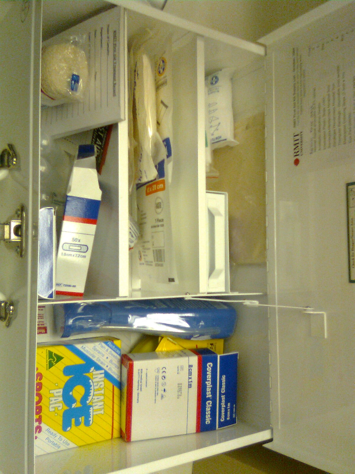 प्रथमोपचार पेटी आतून